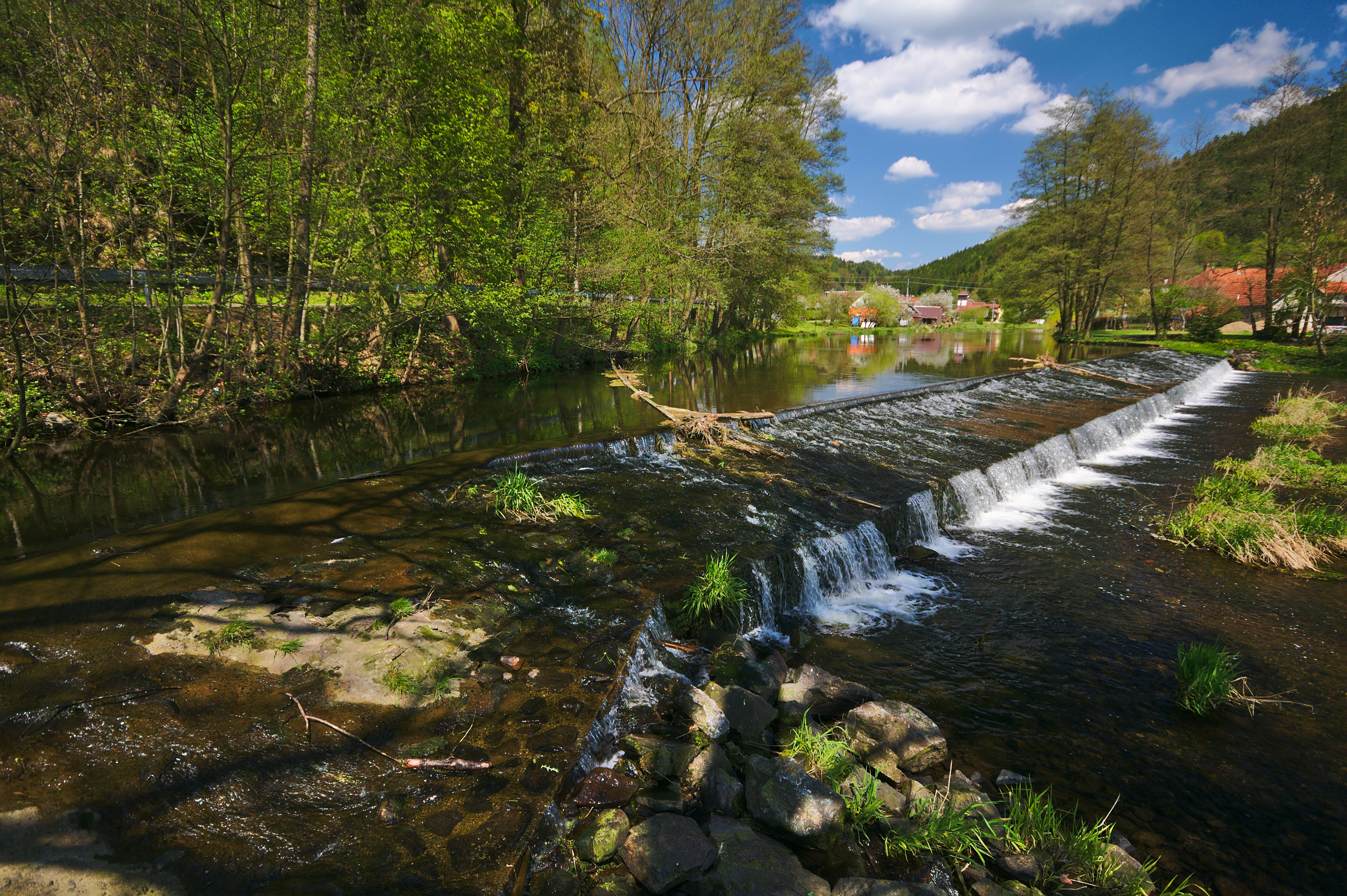 Splav, Koroužné, okres Žďár nad Sázavou